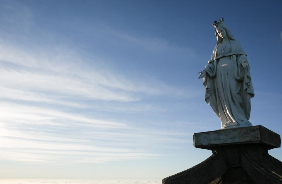 Marienstatue auf dem Gipfel des Tatamailau